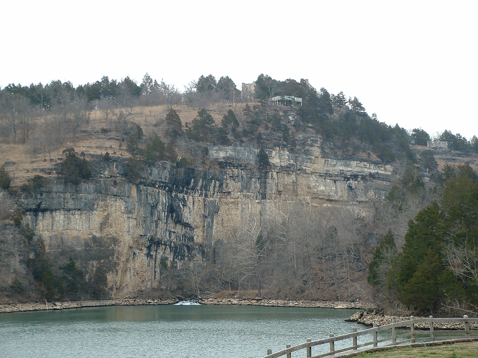 Looking Up at Ha Ha Tonka Ruins